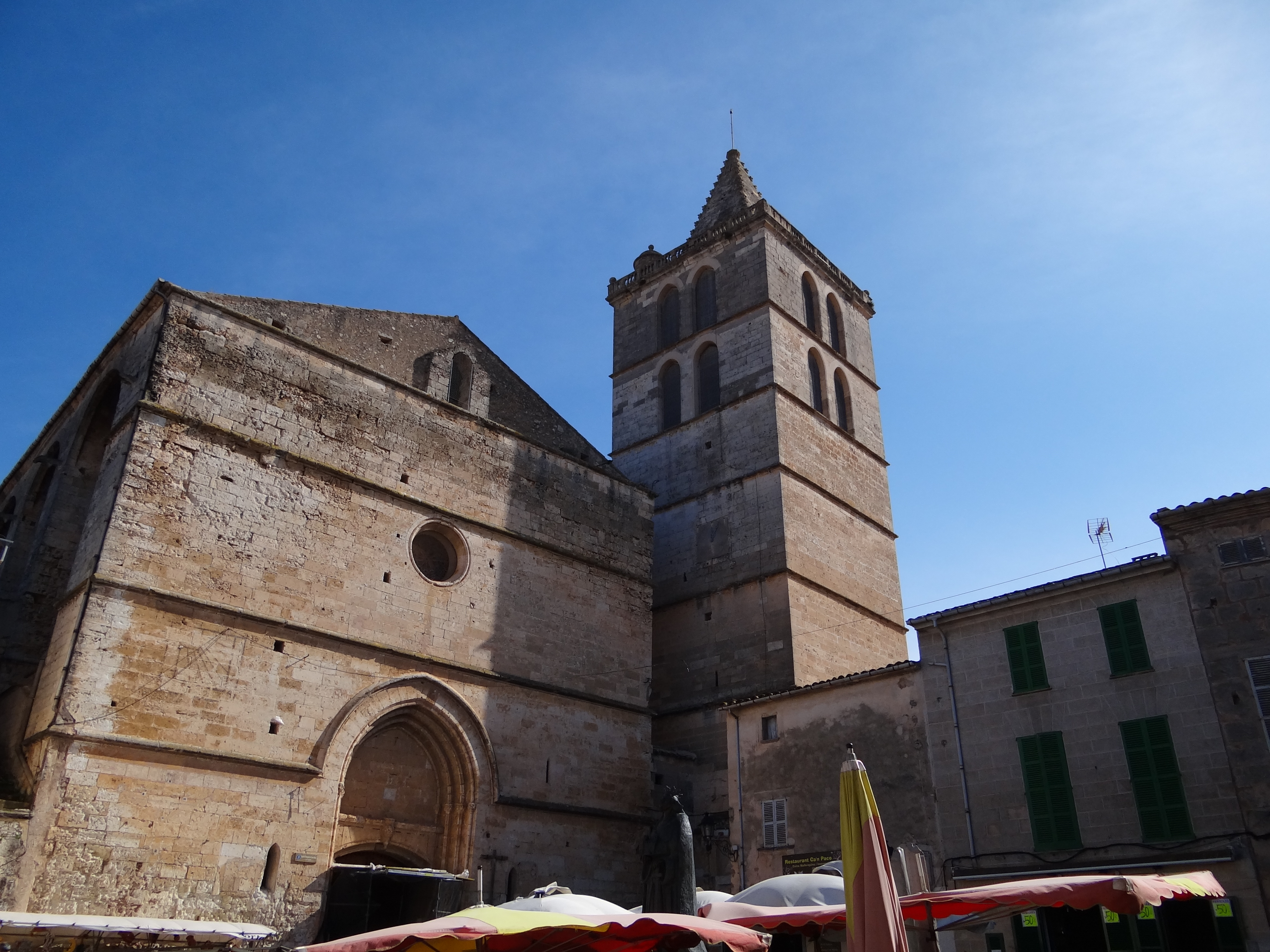 07510 Sineu, Illes Balears, Spain